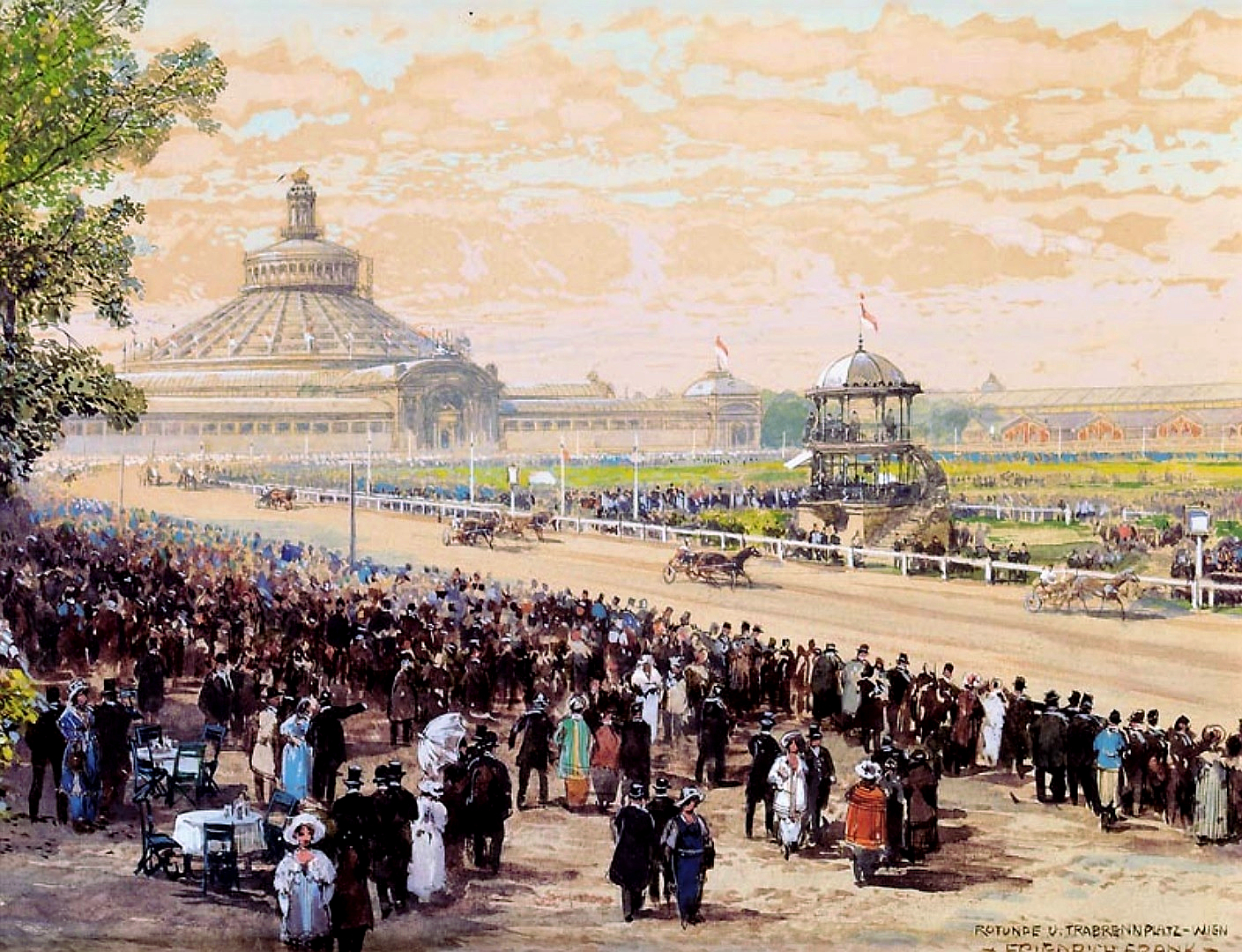 Rotunde und Trabrennplatz - Wien